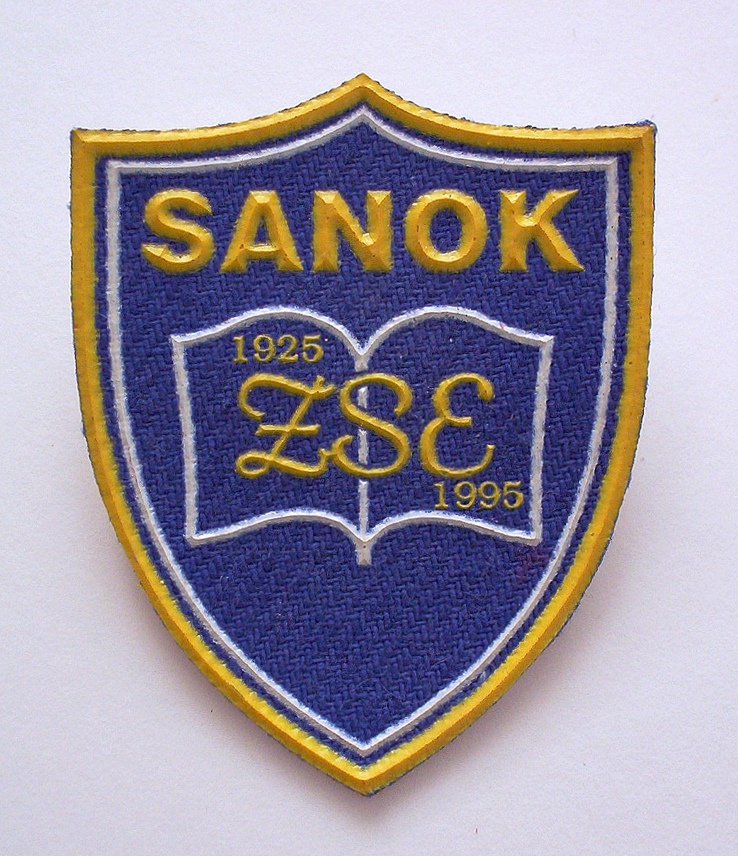 Przypinka wydana z okazji jubileuszu Zespołu Szkół Ekonomicznych w Sanoku 1925-1995.